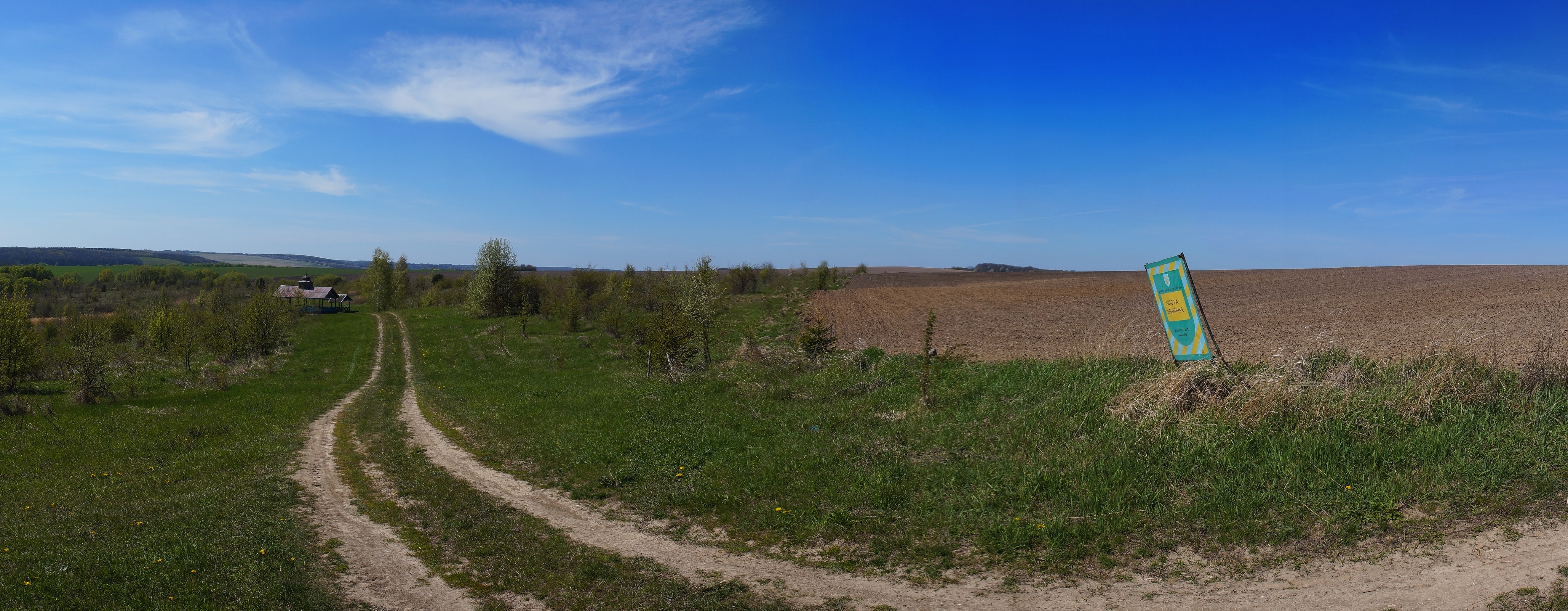 Чиста криничка, Деражнянський район, поблизу с. Слобідка Шелехівська